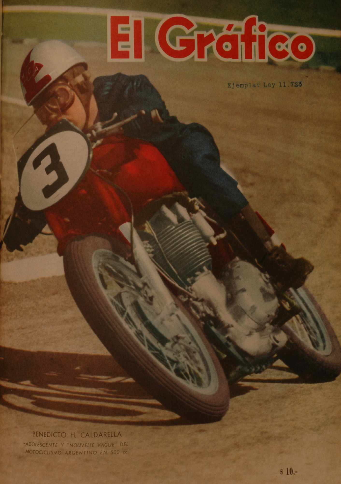 El Grafico del 20 de Julio de 1960. Edicion 2130